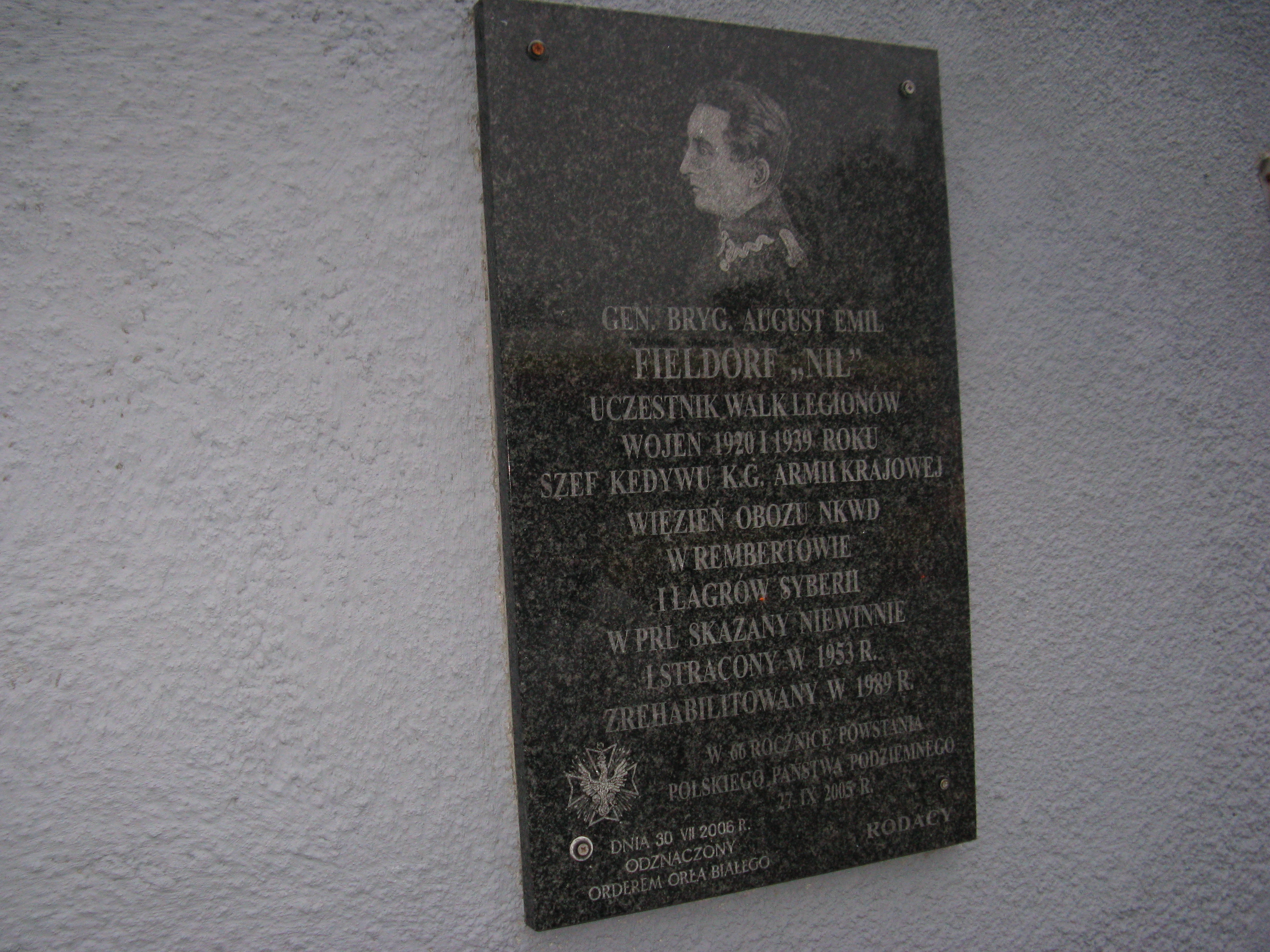 Tablica upamiętniająca Generała Augusta Fildorfa przy wejściu do Akademii Obrony Narodowej.